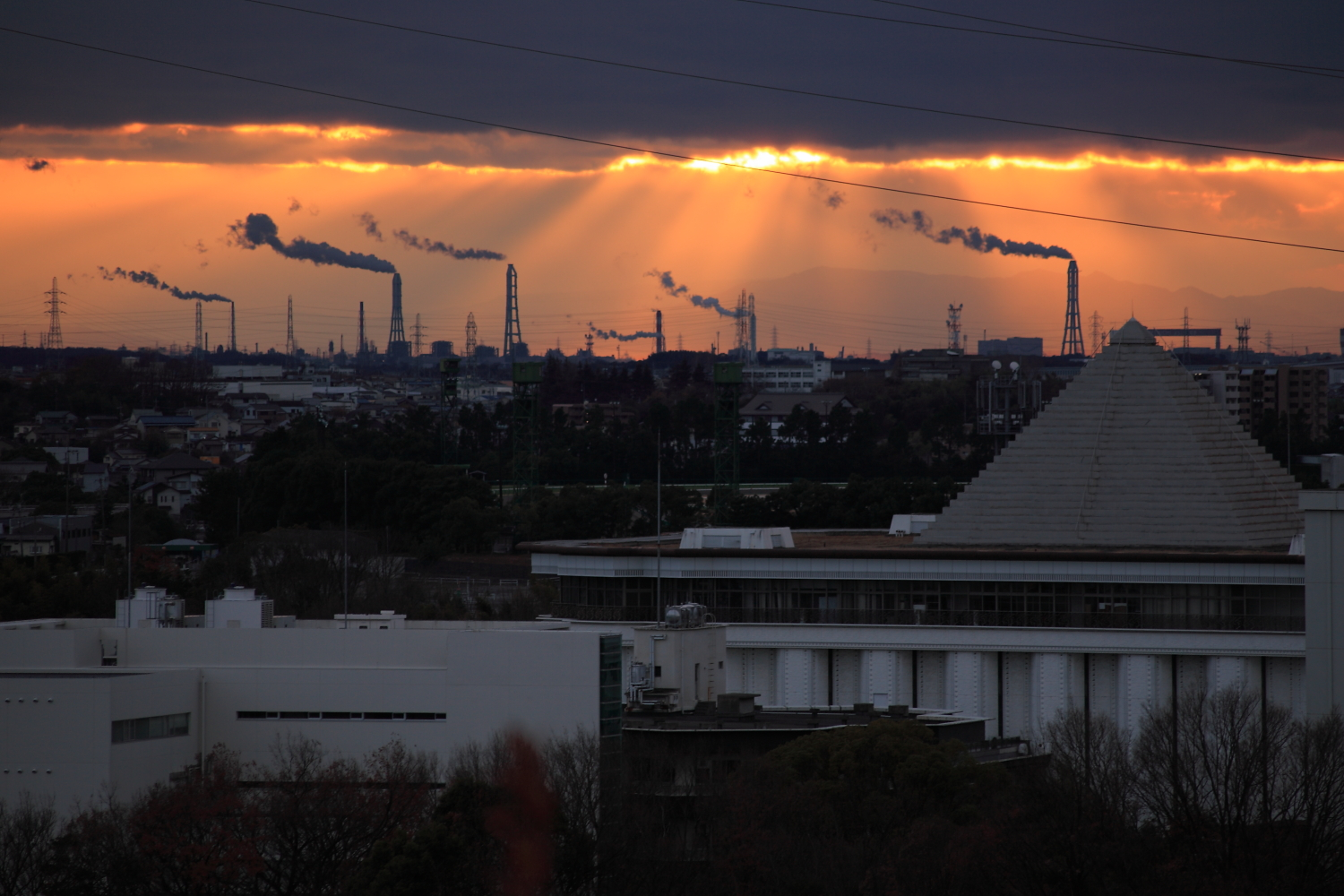 二村山展望台からの眺め（冬）（豊明市、2010年）